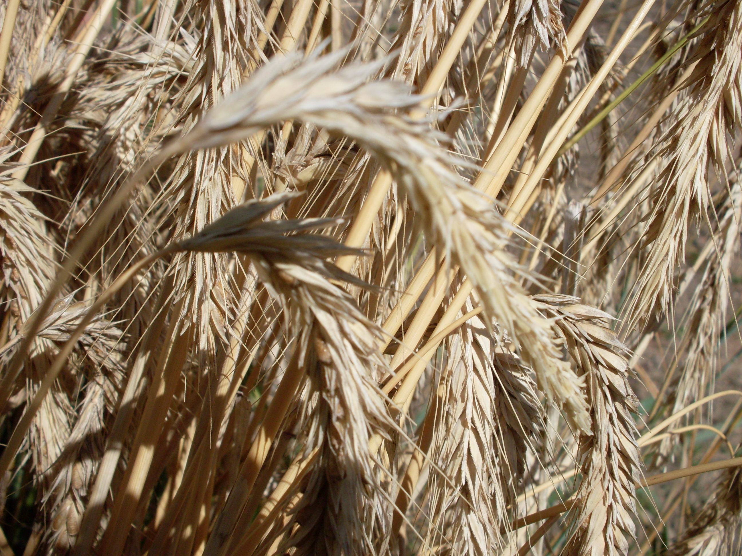 Seigle (Secale cereale) dans le jardin botanique Henri-Gaussen, Toulouse, France